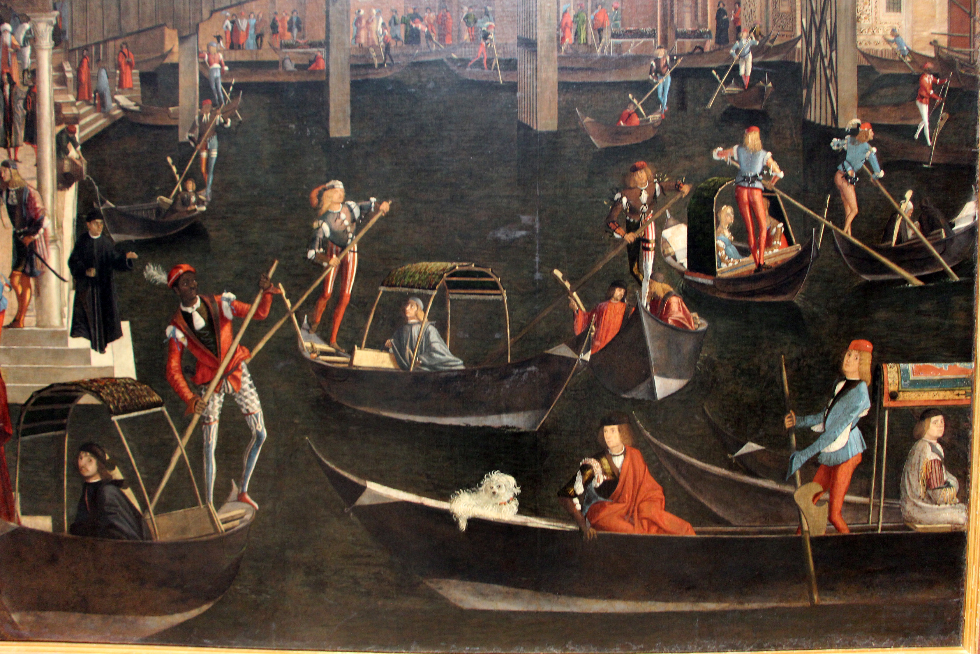 Gallerie dell'Accademia - MIBAC The making of this document was supported by Wikimedia CH. (Submit your project!) For all the files concerned, please see the category Supported by Wikimedia CH. This is a photo of a monument which is part of cultural heritage of Italy.